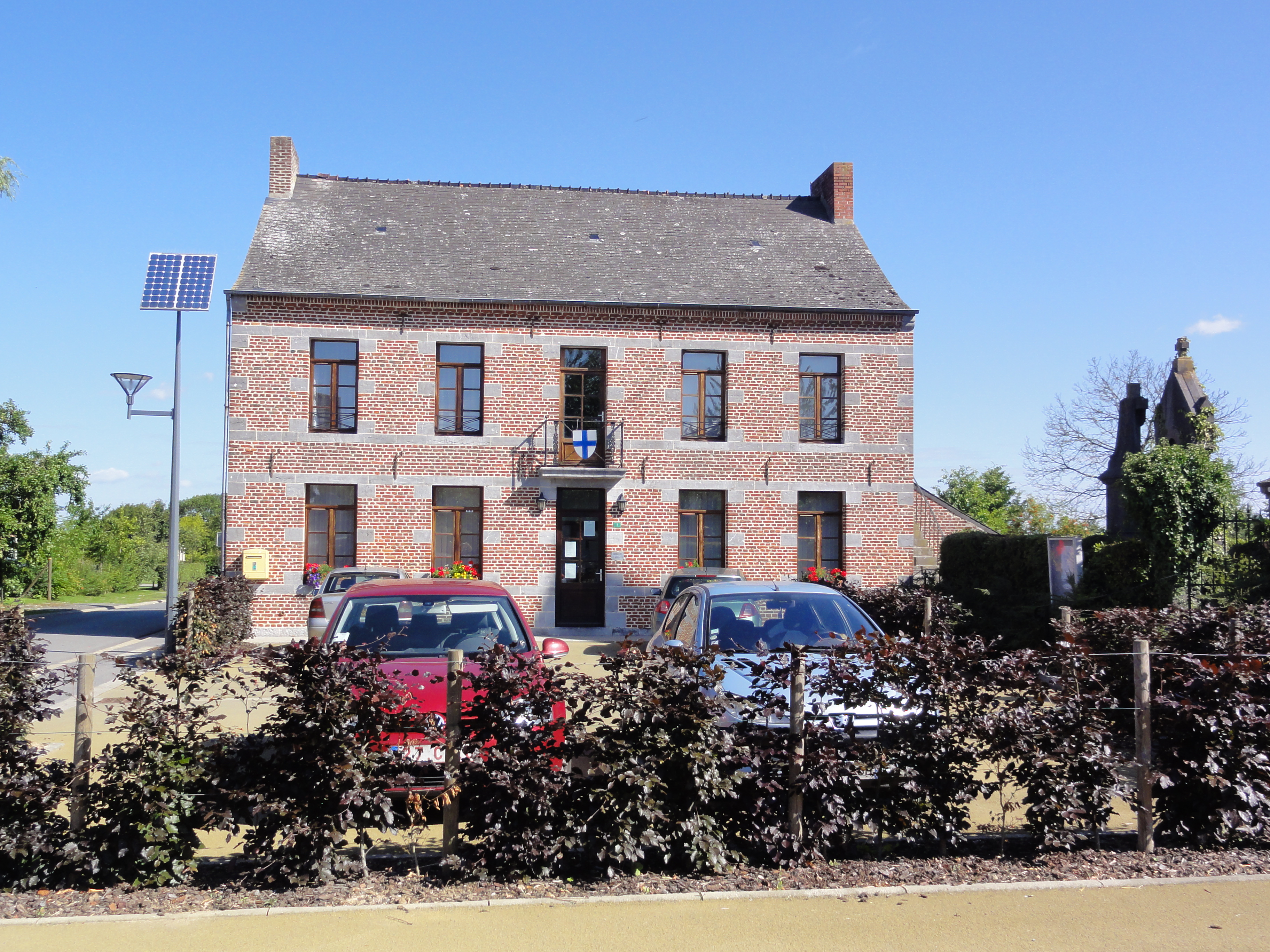 Clairfayts (Nord, Fr) mairie